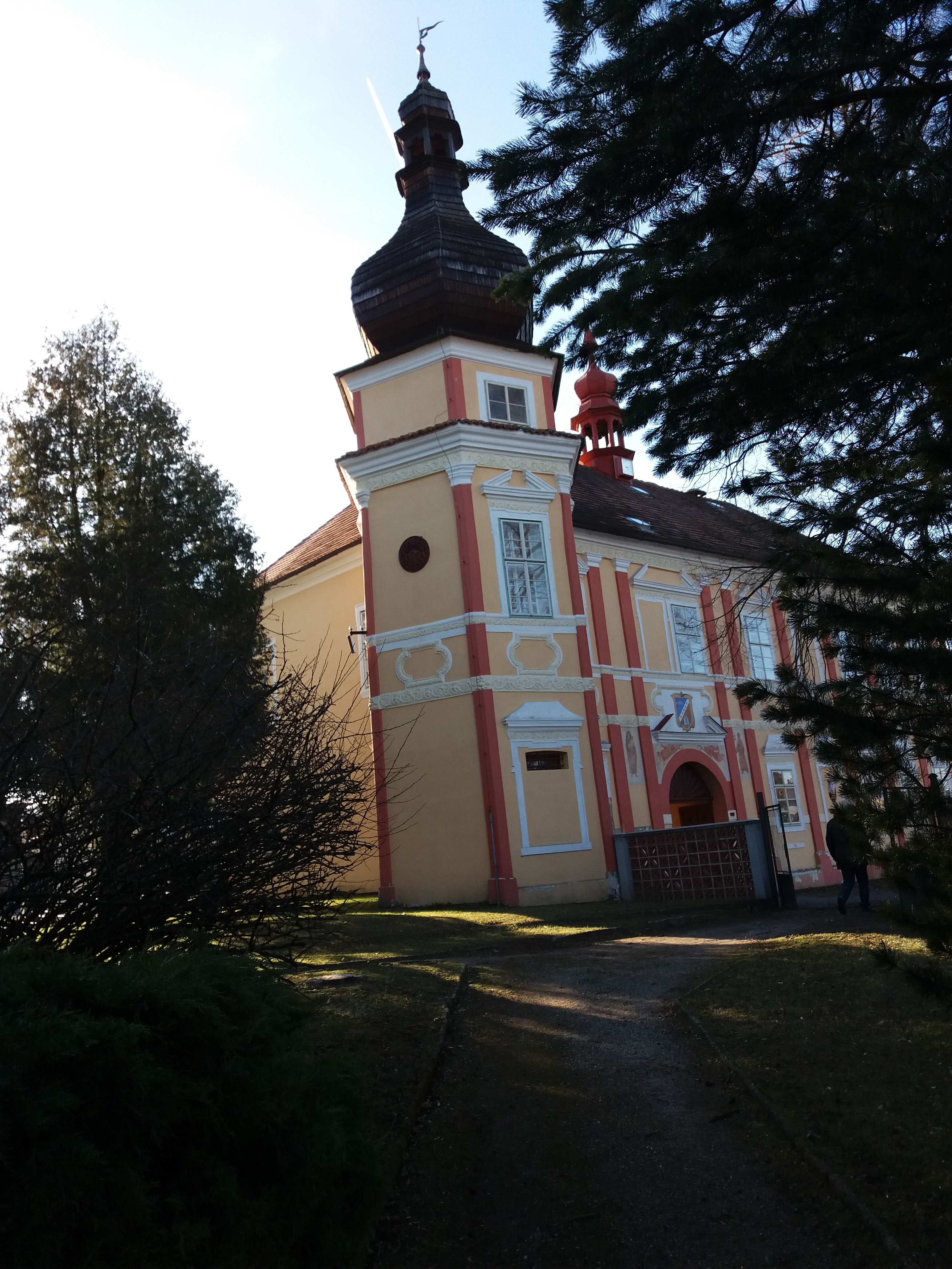 Zámek Čestice, pohled na zámek ze zámeckého parčíku, pohled na věž